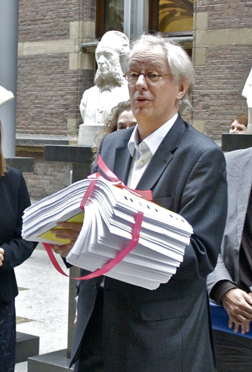 Commissie voorzitter met ruim 21.000 handtekeningen petitie "Uit de kast, Uit de klas"